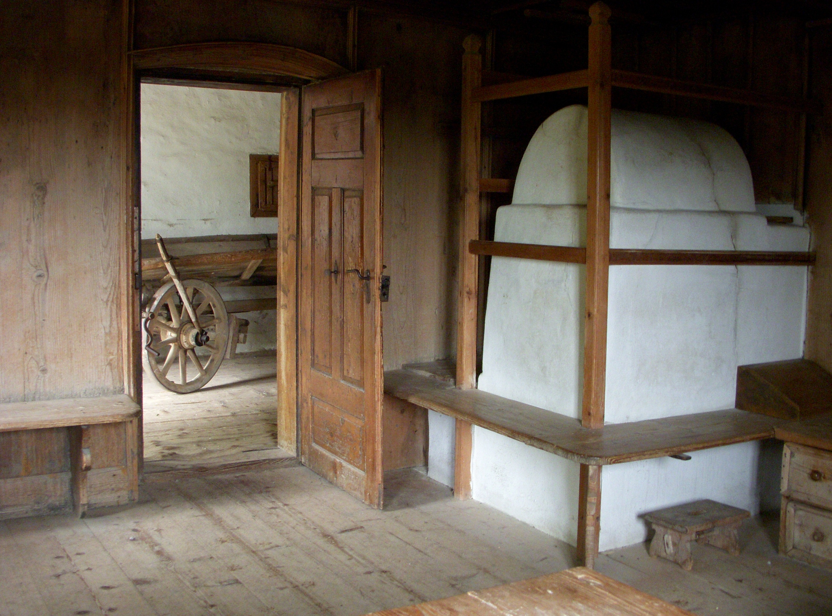 Museum Tiroler Bauernhöfe in Kramsach, Österreich (Hof aus Hatting)